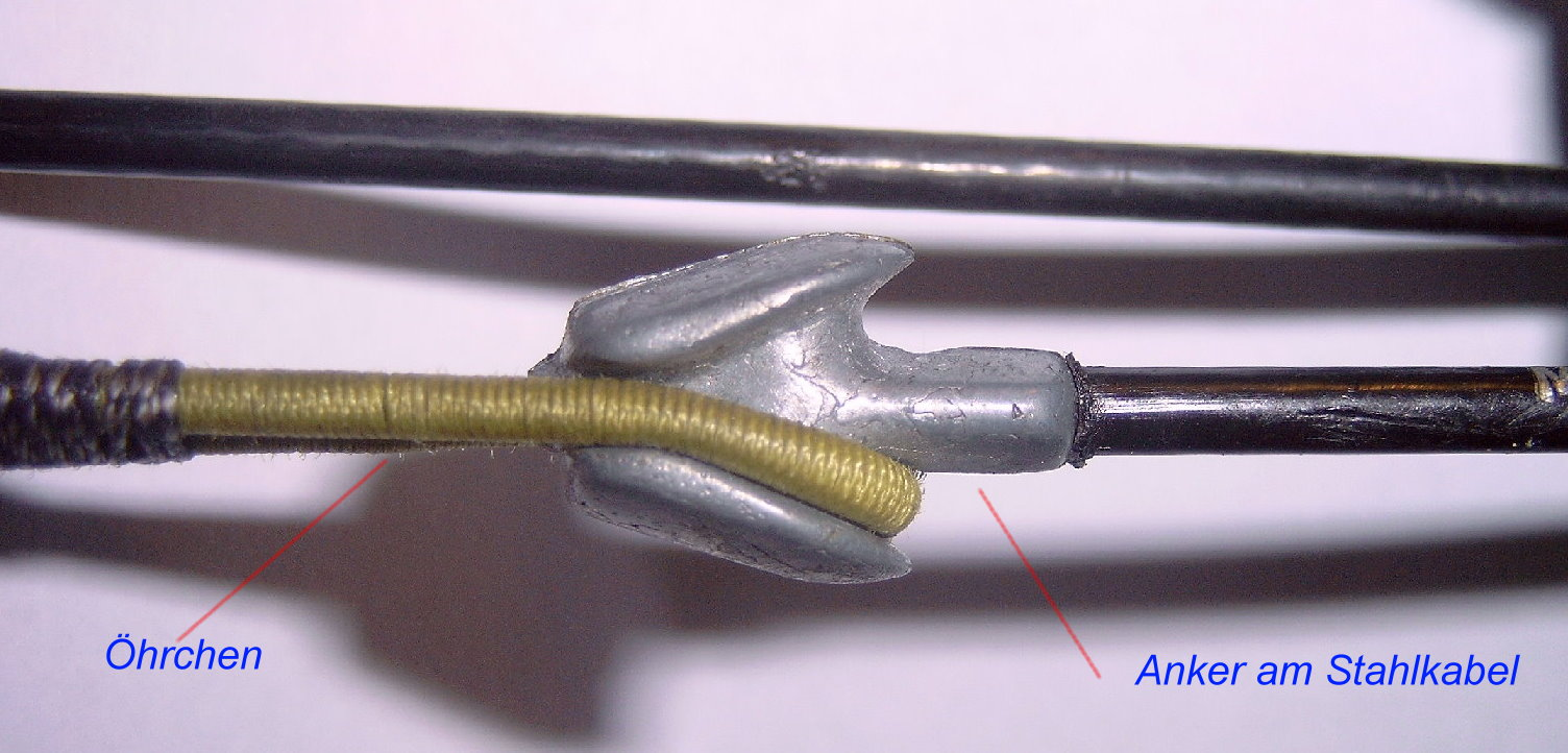 Anker eines Compoundbogens. Anker am Ende des Stahlkabels mit eingehängter Bogensehne Öhrchen